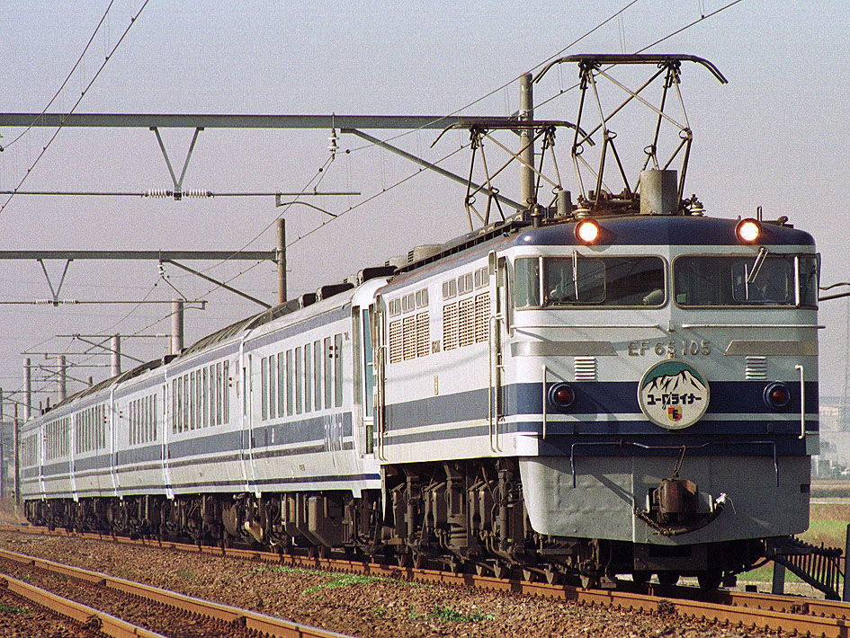 JR東海 EF65 105けん引「ユーロライナー」